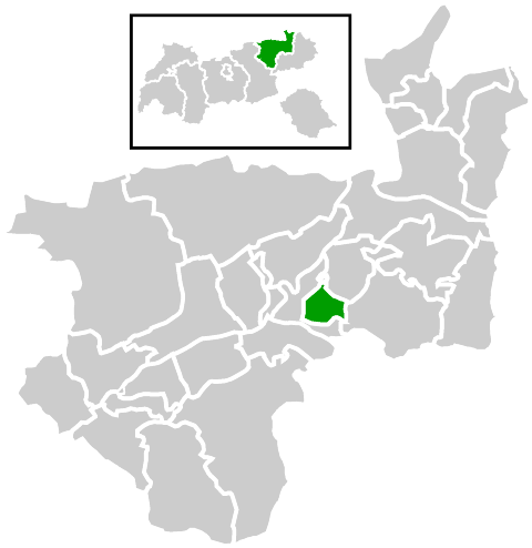 Lage der Gemeinde innerhalb des Bezirks Kufstein